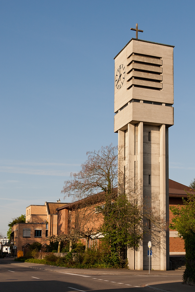 Bruder Klaus Kirche mit freistehendem Kirchturm in Diessenhofen (TG)